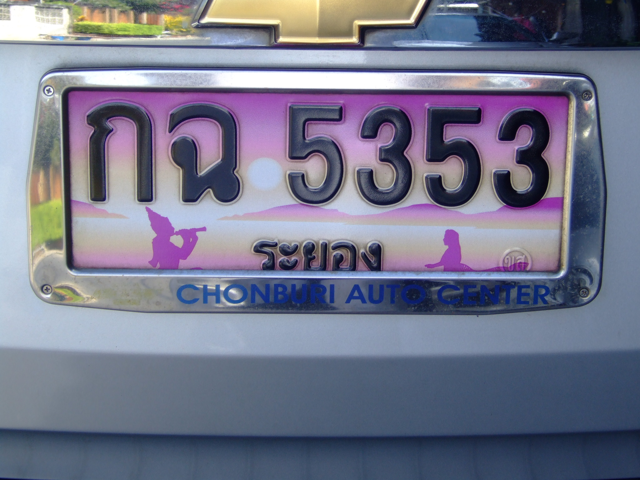 Foto Propria Novembre 2009